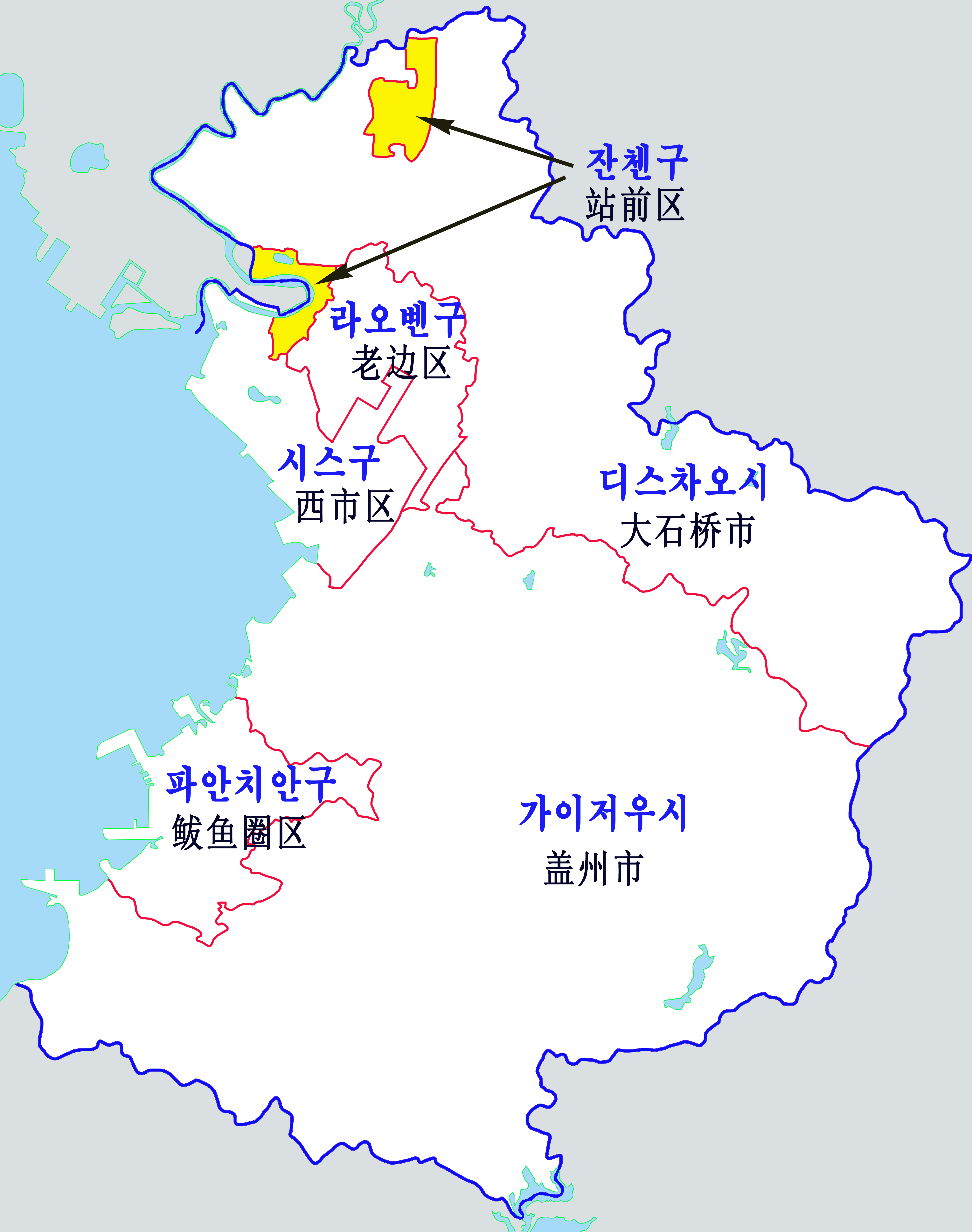 잉커우시 행정지도